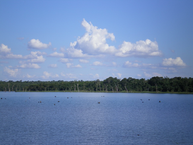 Fotos tomadas por mí, a inicios del año 2008 vista del lago